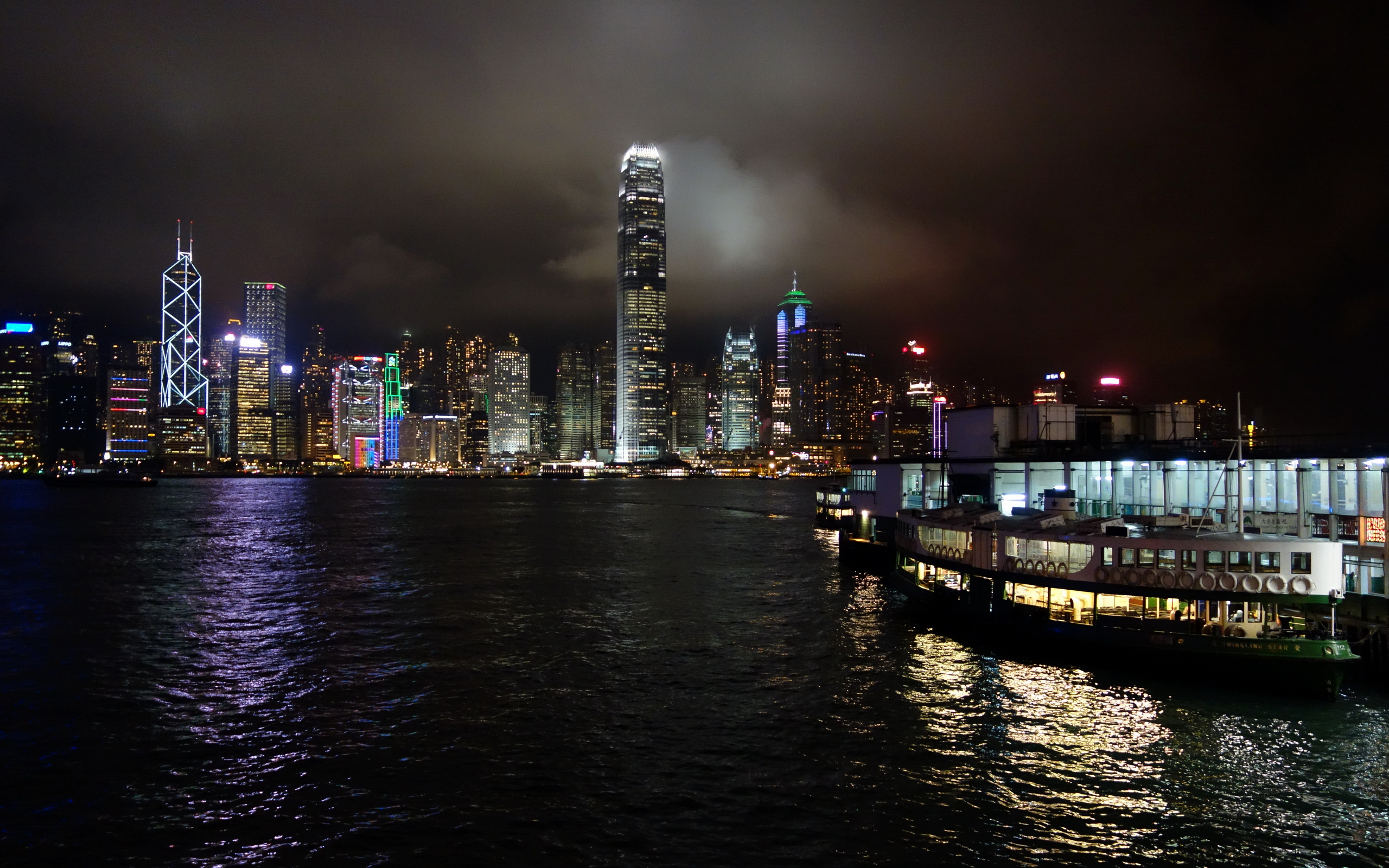 中文（中国大陆）: 维多利亚港中环夜景